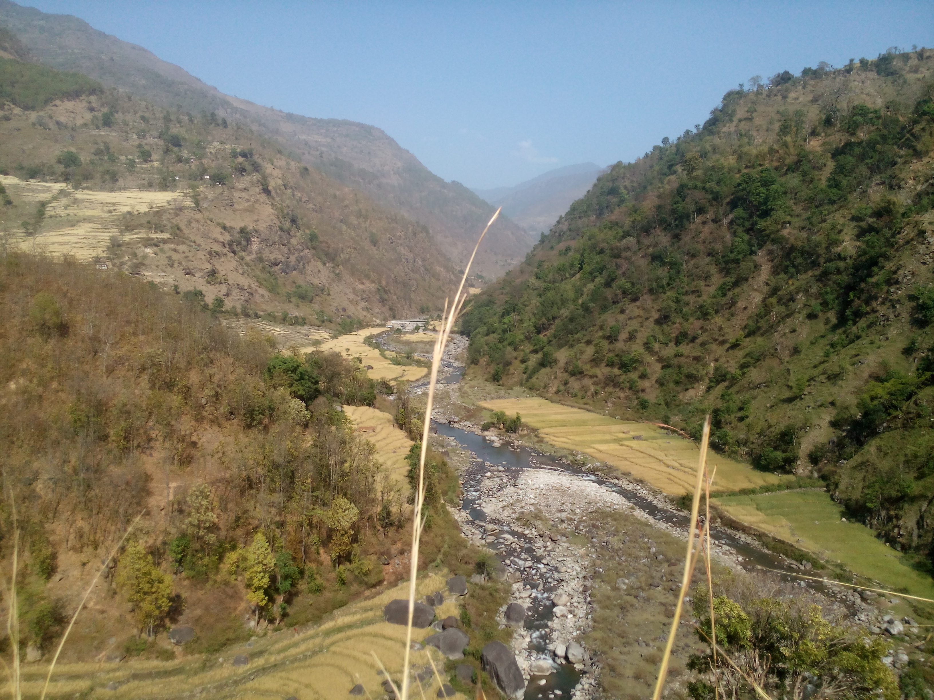 नेपाली: यो म कृष्ण बहादुर चन्द सोडारी द्वारा खिचिएको तस्विर हो.